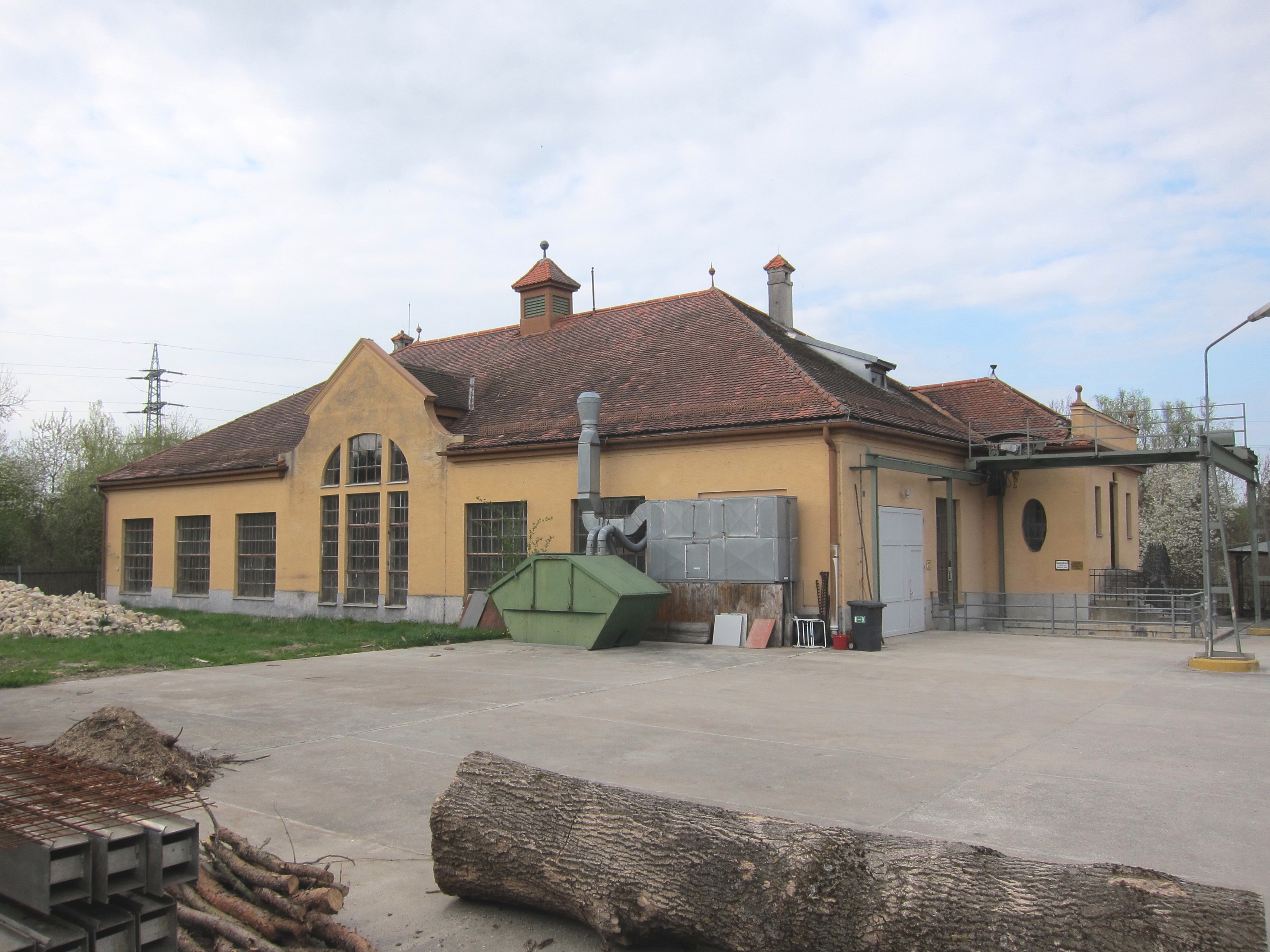 Ehemaliges Uppenbornwerk, jetzt Bauhof